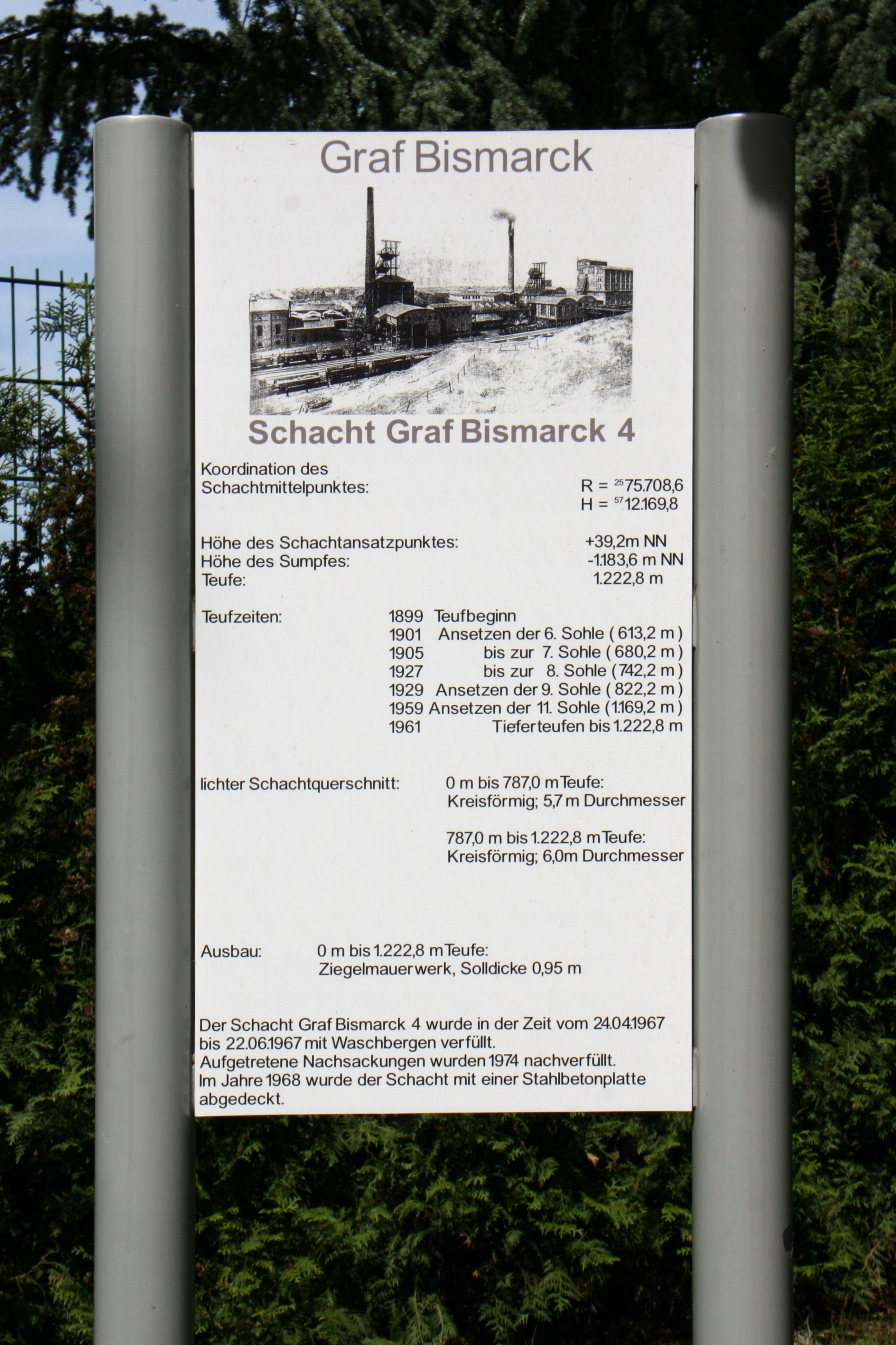 Schacht 1 der Zeche Graf Bismarck 1/4, Uechtingstraße in Gelsenkirchen